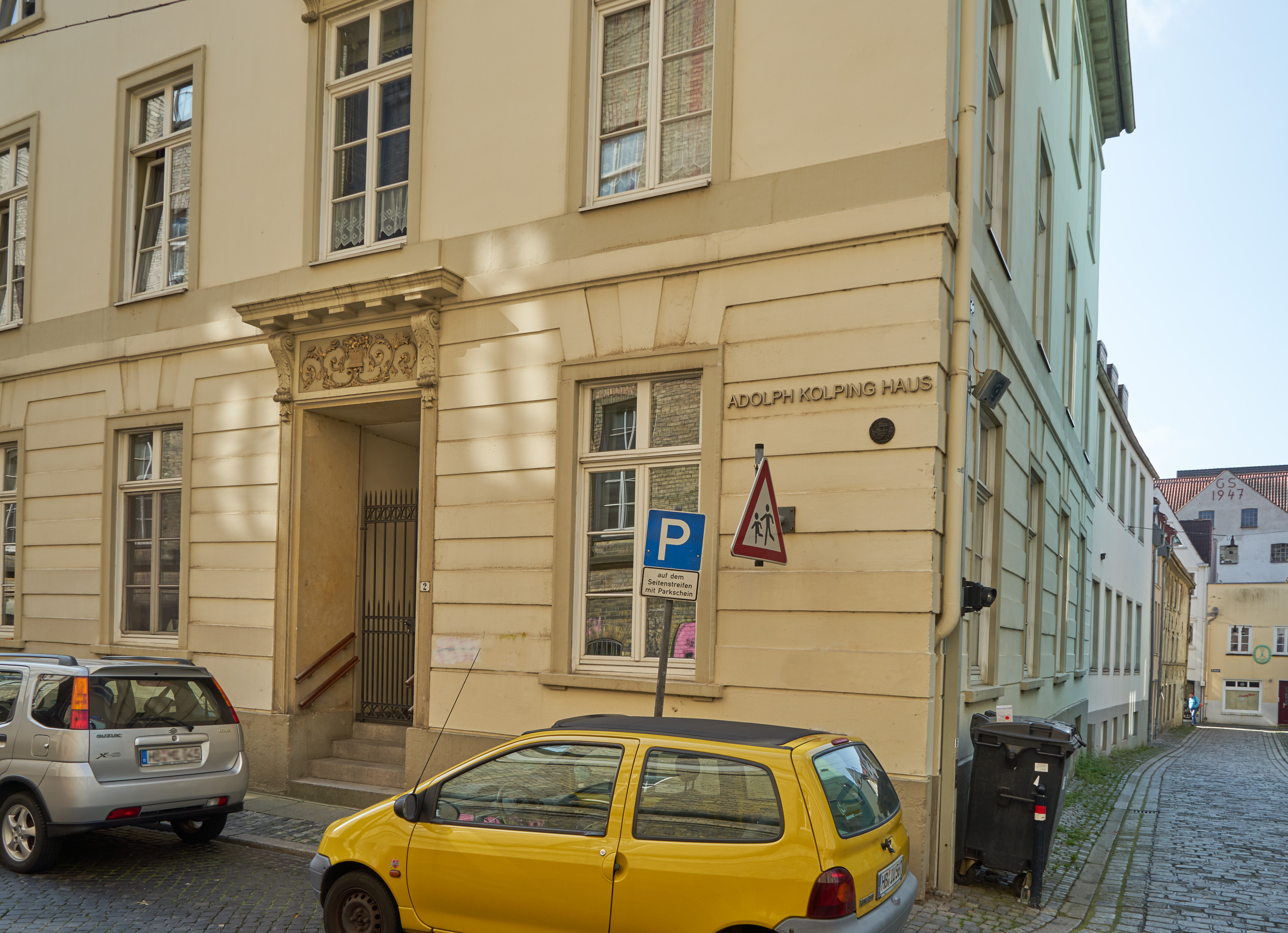 Kindertagesheim St. Johann in Bremen, Kolpingstraße 2Das abgebildete Objekt ist ein geschütztes Kulturdenkmal in der Freien Hansestadt Bremen, mit der Nr. 0720 beim Landesamt für Denkmalpflege registriert.